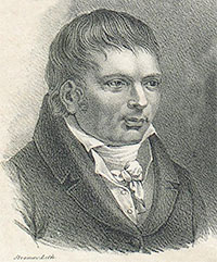 Jonas Magnus Stiernstolpe (1777-1831)